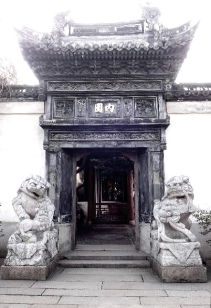 中文（中国大陆）: 早在二百多年前，由钱业界人士购下作为公所。今在上海城隍庙豫园里。